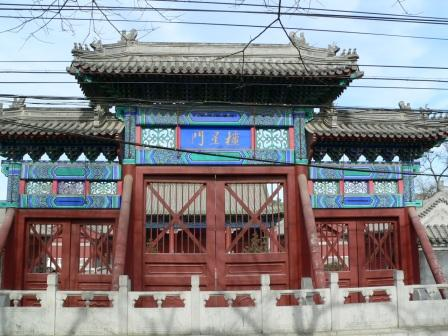 顺天府学的棂星门 2005年2月10日拍摄